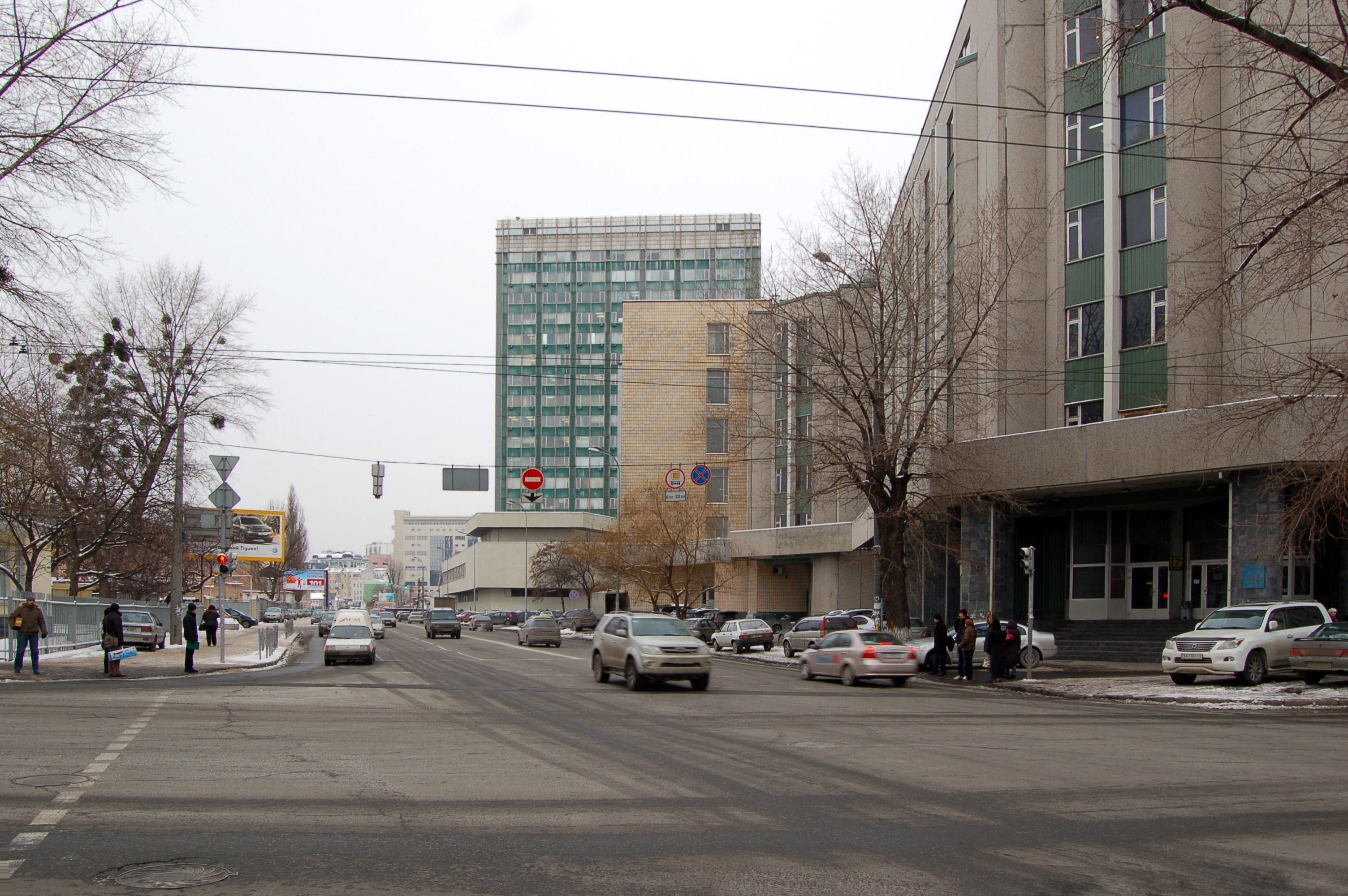 Улица Боженко в Киеве